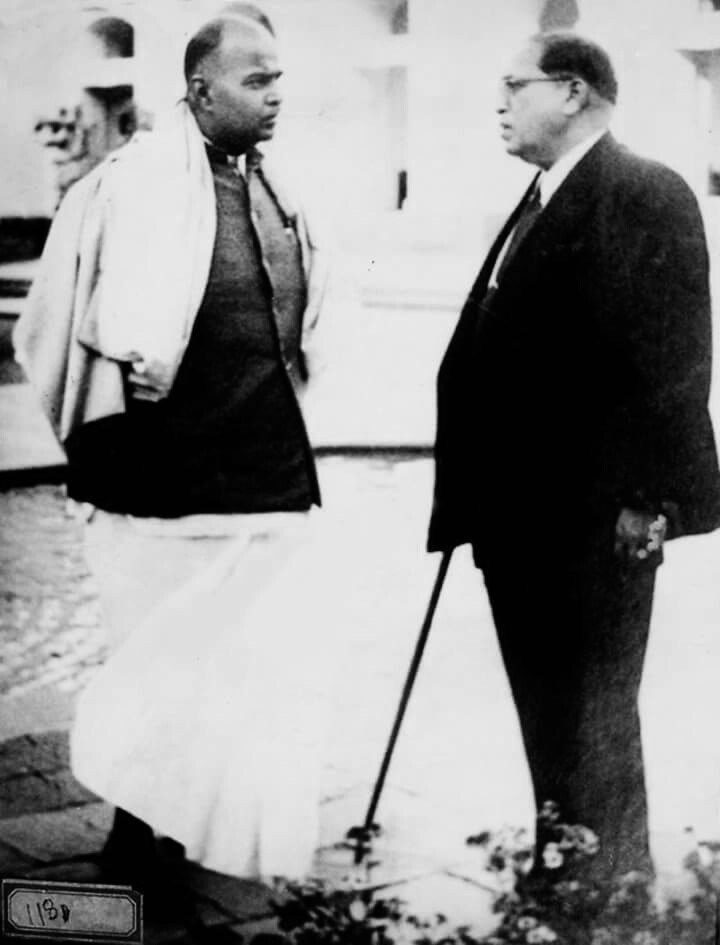 जनता दल संघ (आताचे भा.ज.पा.) चे संस्थापक श्यामप्रसाद मुर्खजी सोबत डॉ. बाबासाहेब आंबेडकर